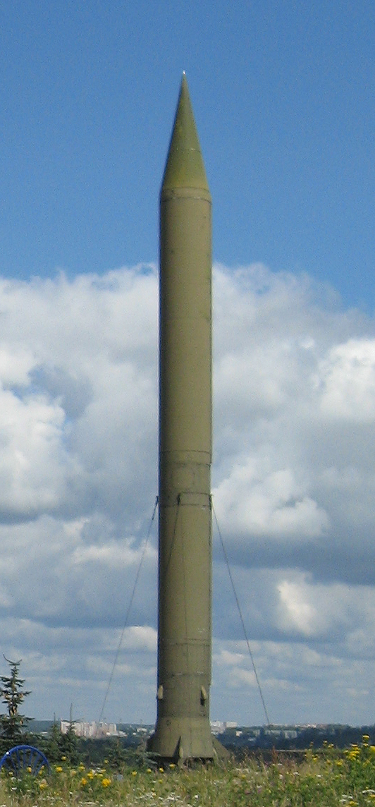 Макет ракеты Р-12 в музее истории космонавтики г. Калуги.